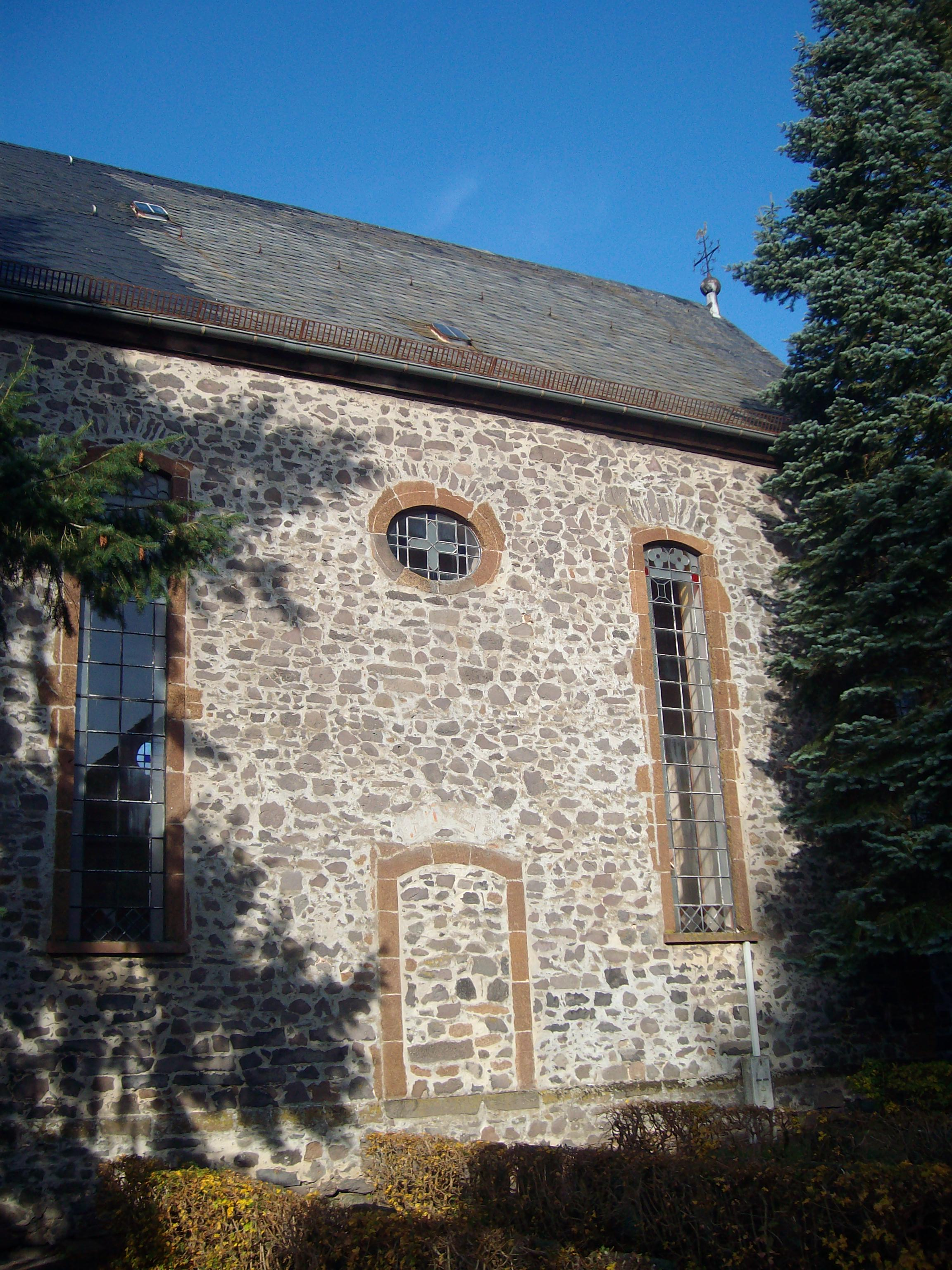 Hospitalkirche Grünberg, Landkreis Gießen, Hessen, Deutschland